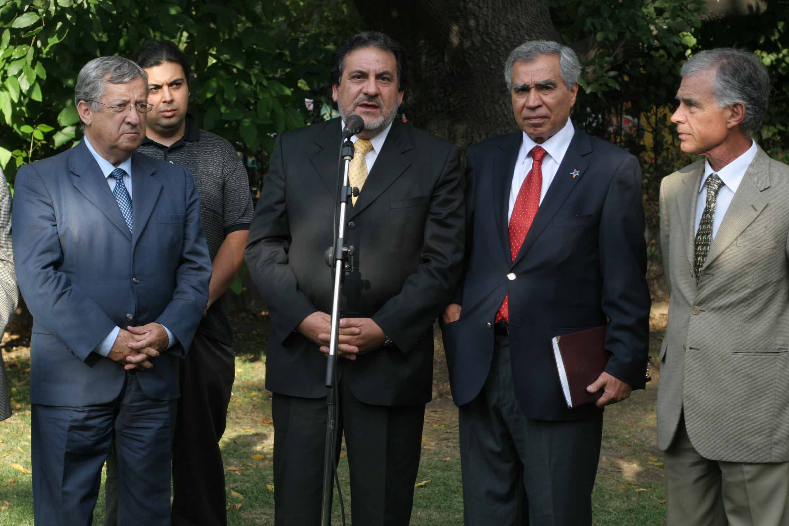 Movimientos Humanista Cristiano y Norte Grande en 2010.